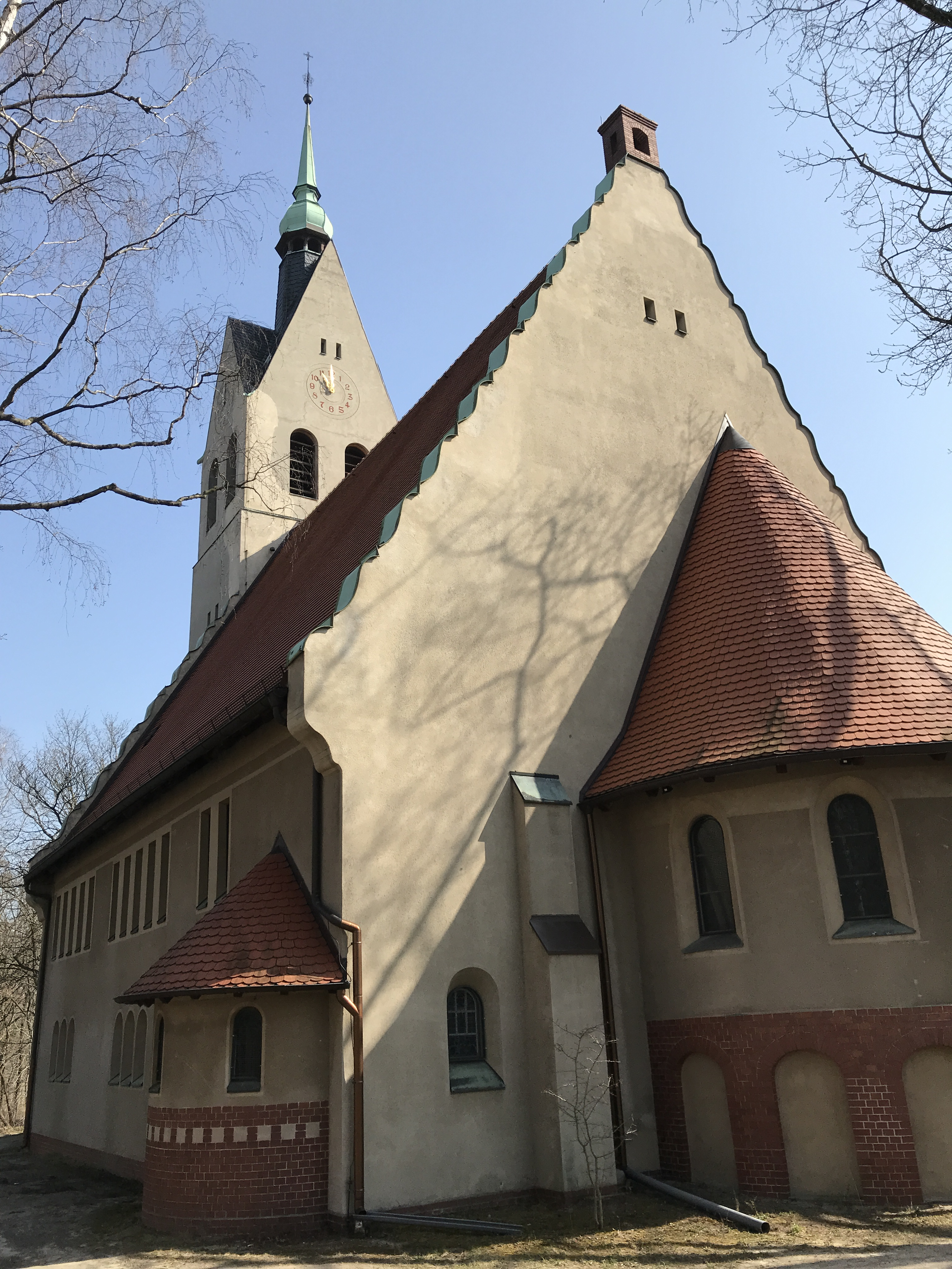 Die Friedenskirche in Wildau im Landkreis Dahme-Spreewald im Land Brandenburg entstand in den Jahren 1908 bis 1911 nach Plänen des Königlichen Baurats Georg Büttner im Jugendstil.